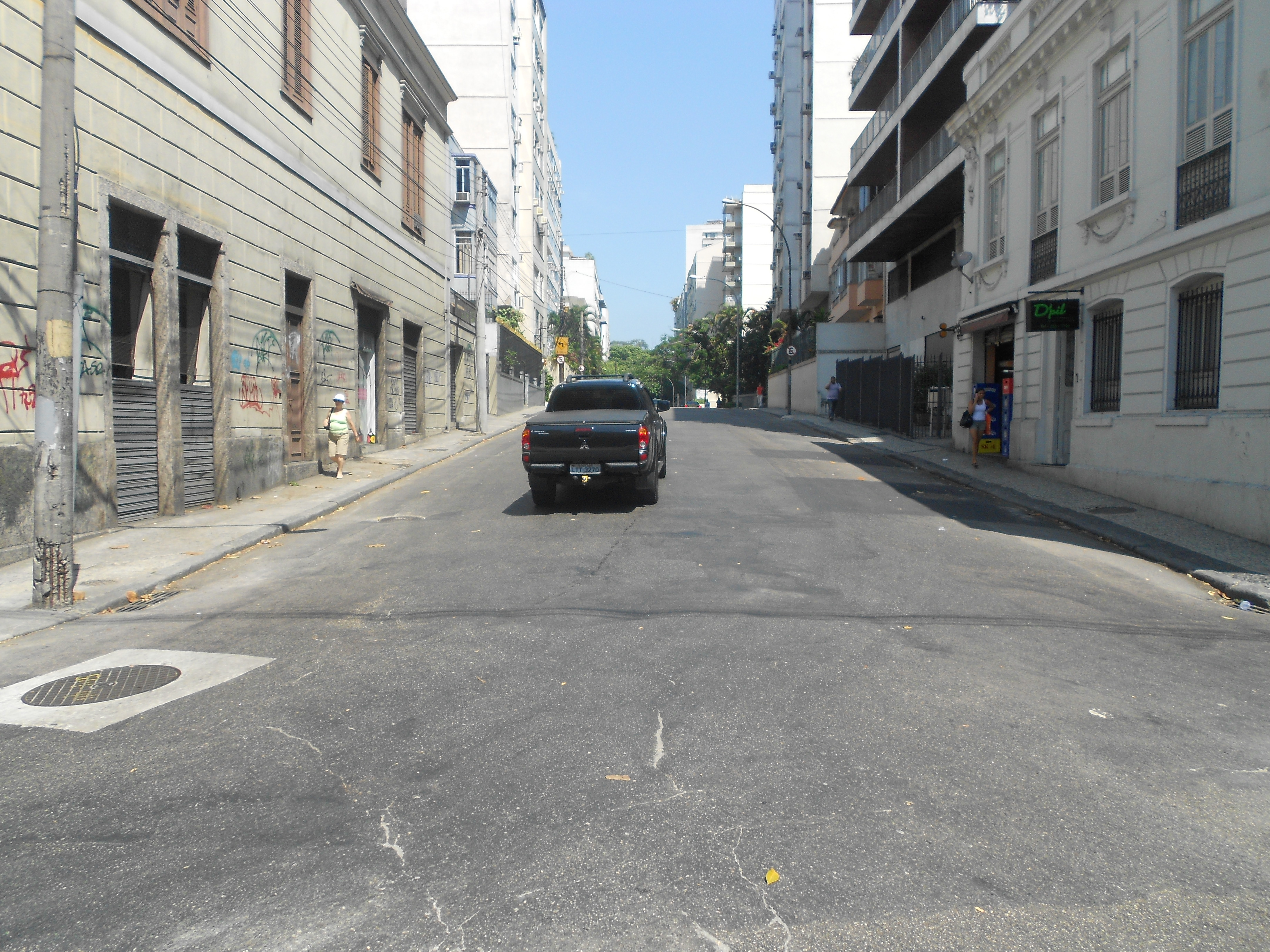 Vista da Rua Soares Cabral, em Laranjeiras, Rio de Janeiro, Brasil.